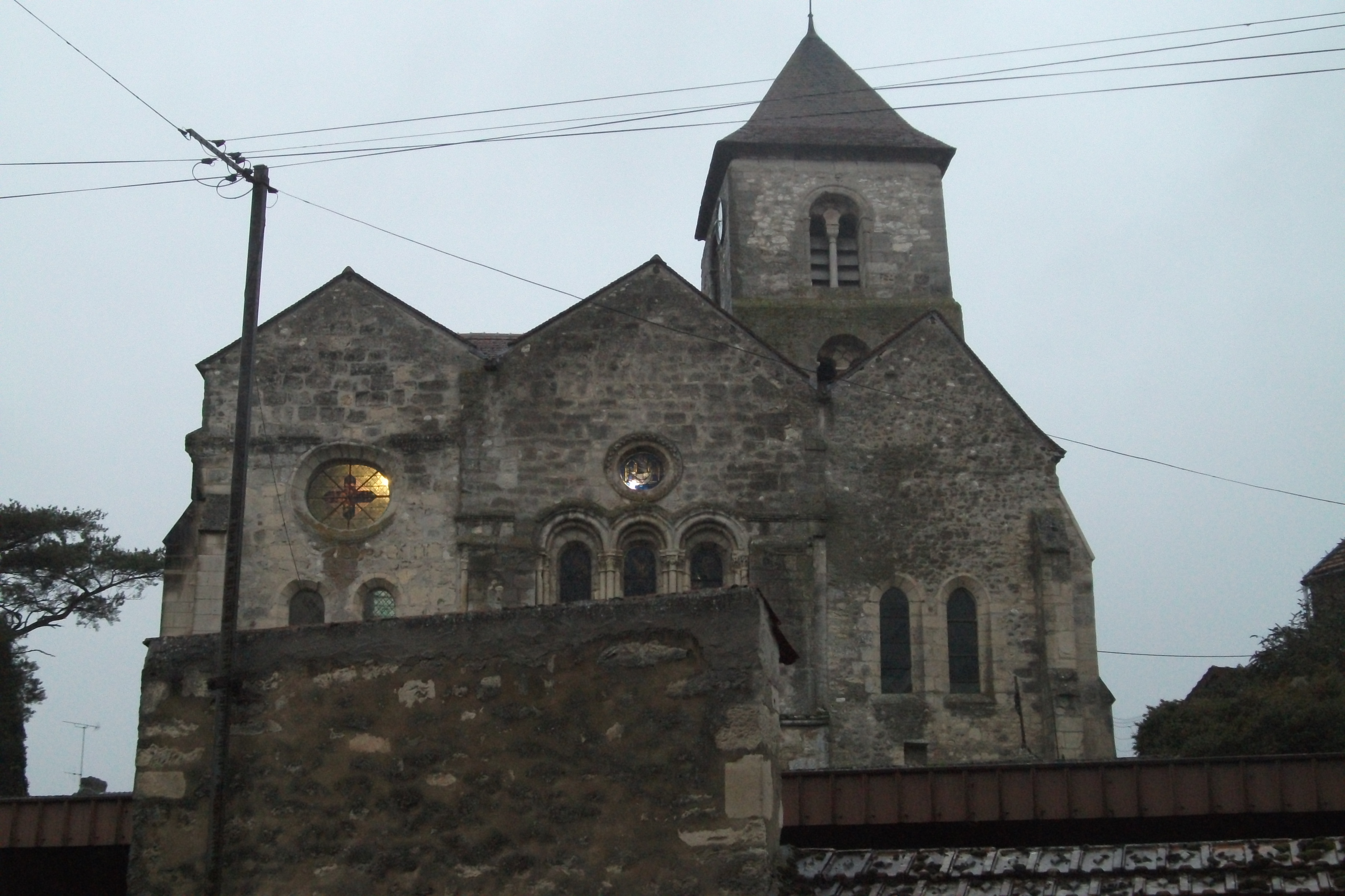 Crugny_vue de son église (St-Pierrre).